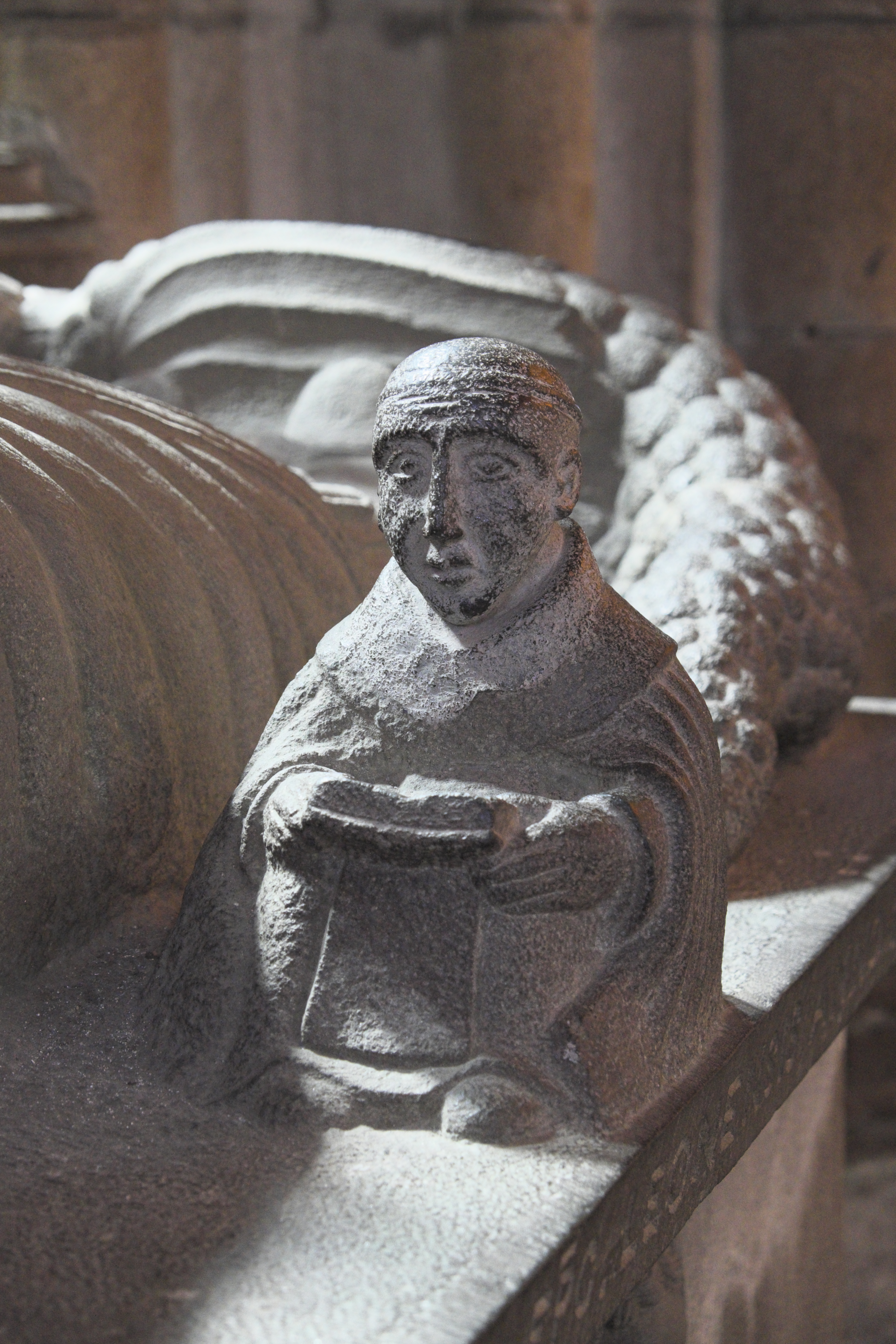 Ehemalige Kathedrale Saint-Paul-Aurélien in Saint-Pol-de-Léon im Département Finistère (Region Bretagne/Frankreich), Grab des Bischofs René de Rieux-Sourdéac († 1651)